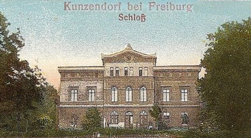 Pałac w Mokrzeszowie, fragment widokówki przed 1939 r.